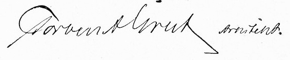 Torben Grut - signatur